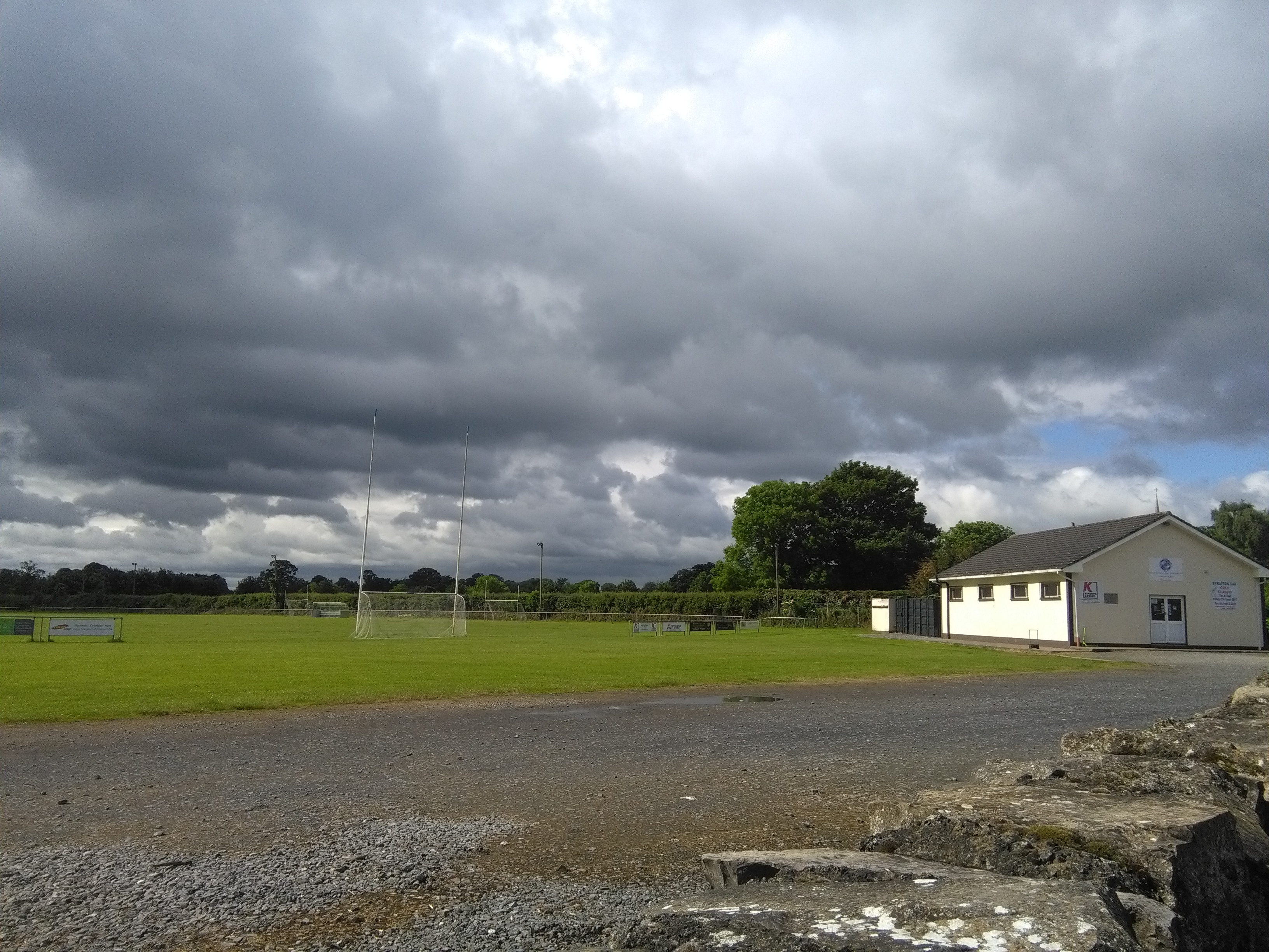 Straffan GFC grounds